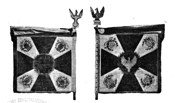 sztandar 3 Pułku Szwoleżerów Mazowieckich